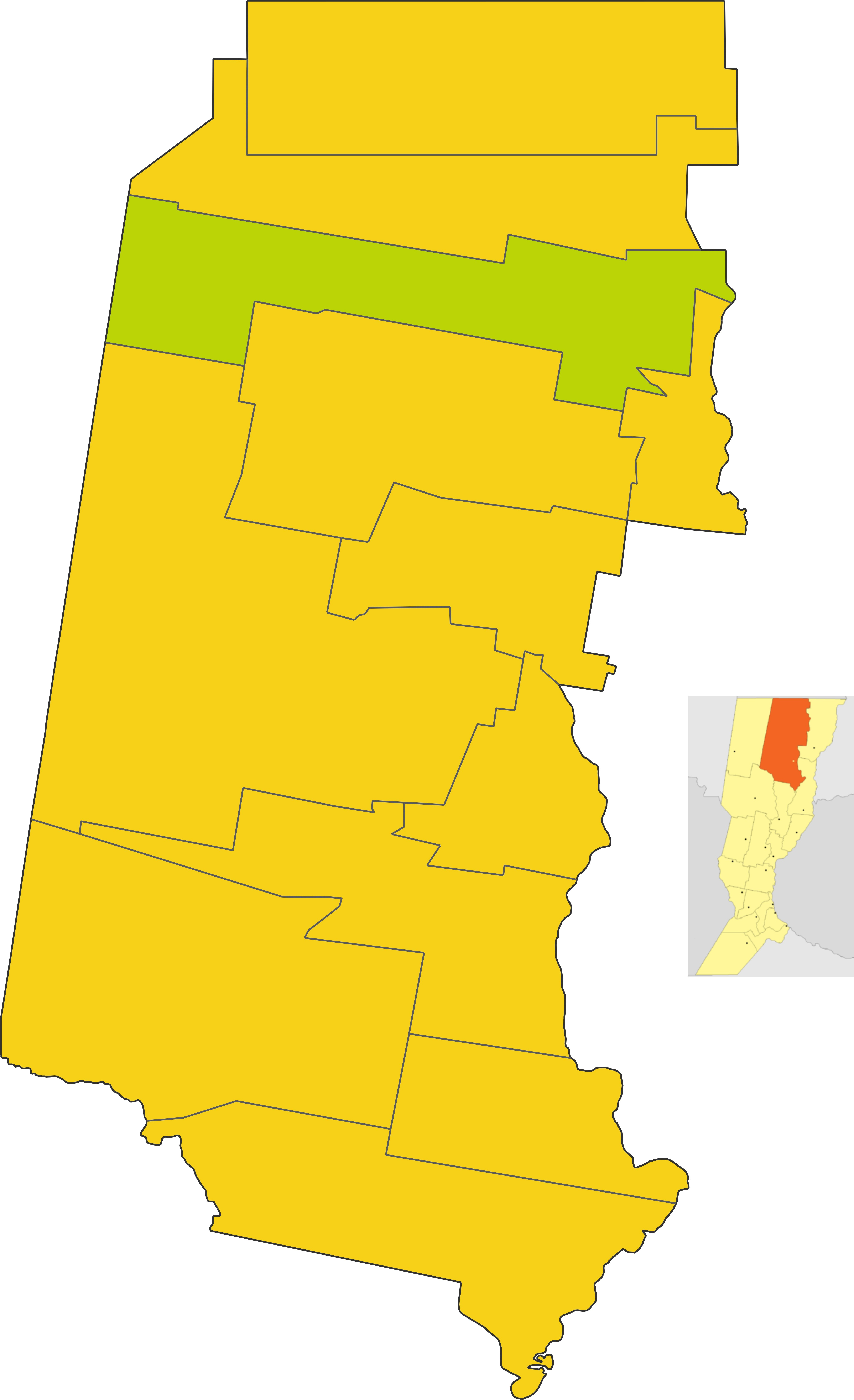 Map of the comuna de Golondrina in Vera department, Santa Fe province, Argentina